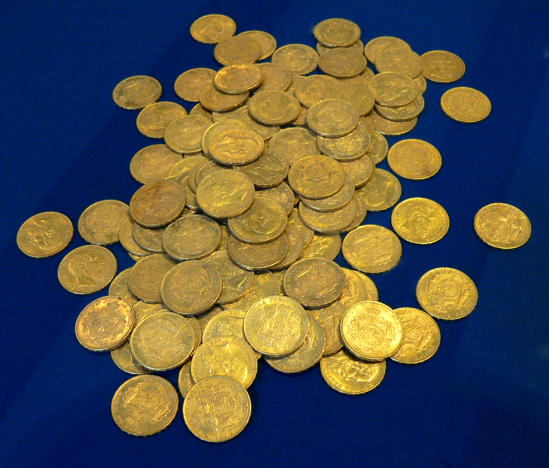 Münzschatz von Lüneburg